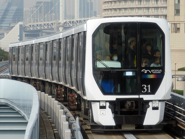 ゆりかもめ7300系車両 Panasonic Lumix DMC-FZ150